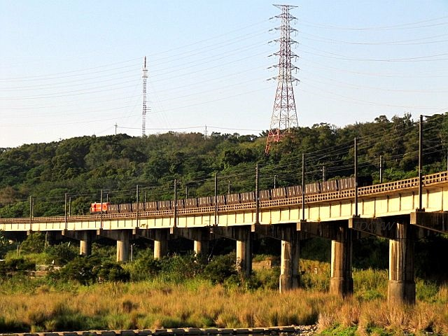 台鐵縱貫線鳳山溪橋 was filmed by TDCKW on 20101218